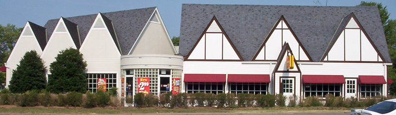 Photo du premier restaurant du Colonel Sanders, fondateur de KFC